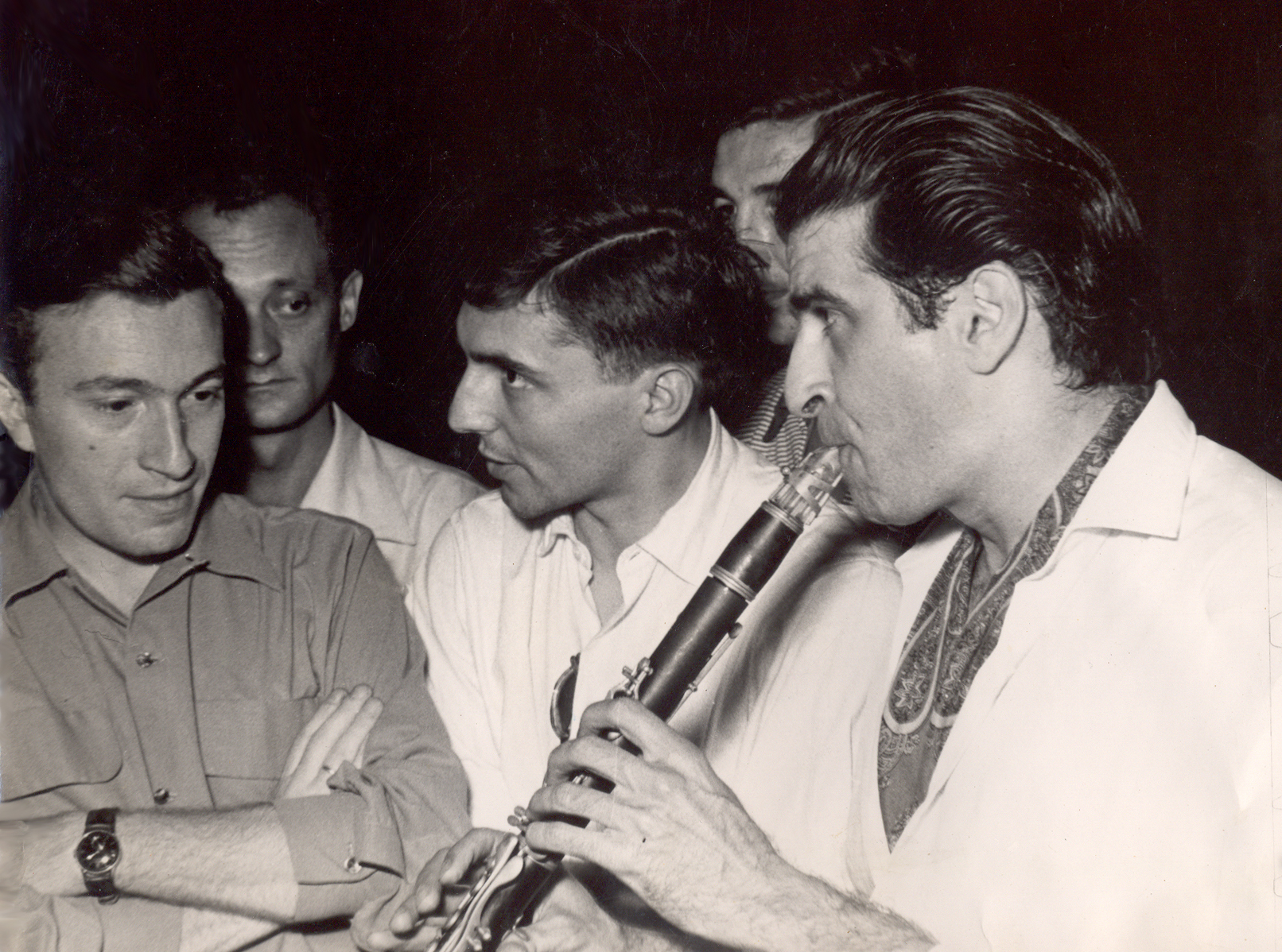 Srpskohrvatski / српскохрватски: Mihailo Živanović (prvi levo) i poznati svetski klarinetista Toni Skot (prvi desno).